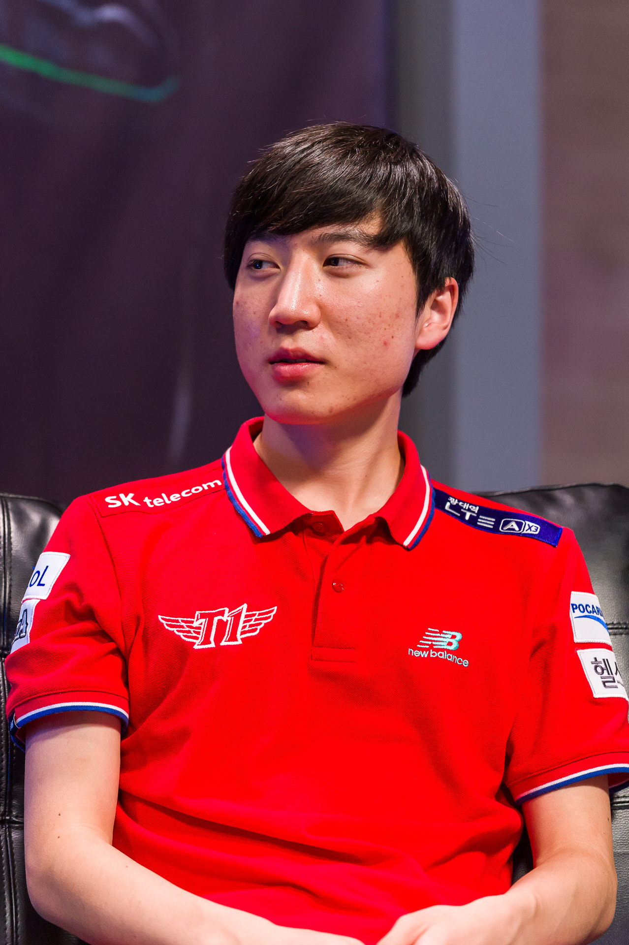 INoVation aux 2014 WCS Global Finals.